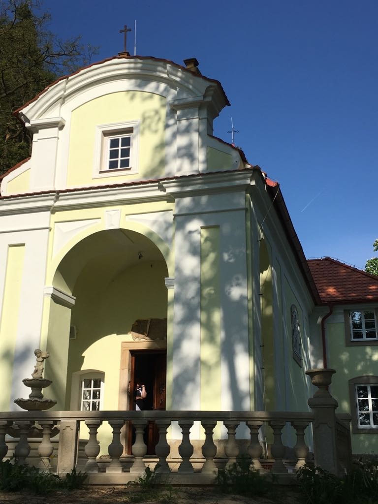 Kaple, kveten 2018